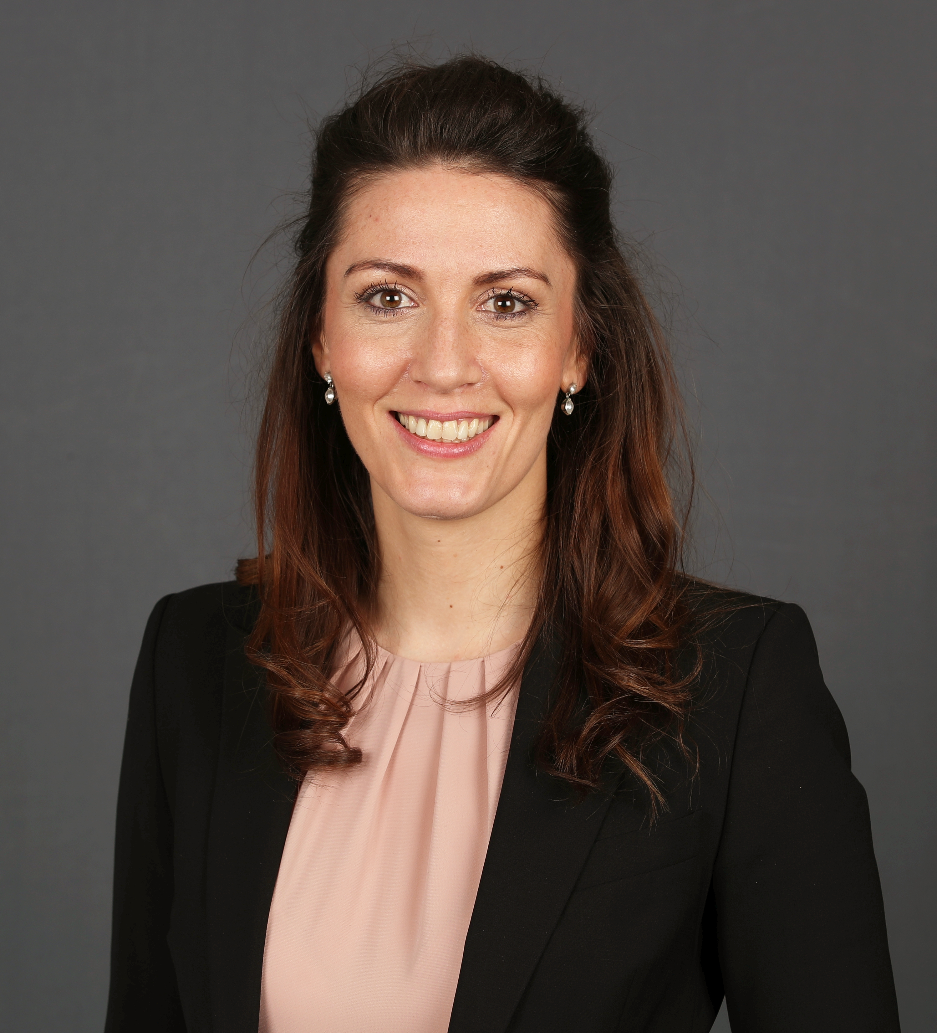 Nicole Bauer, FDP